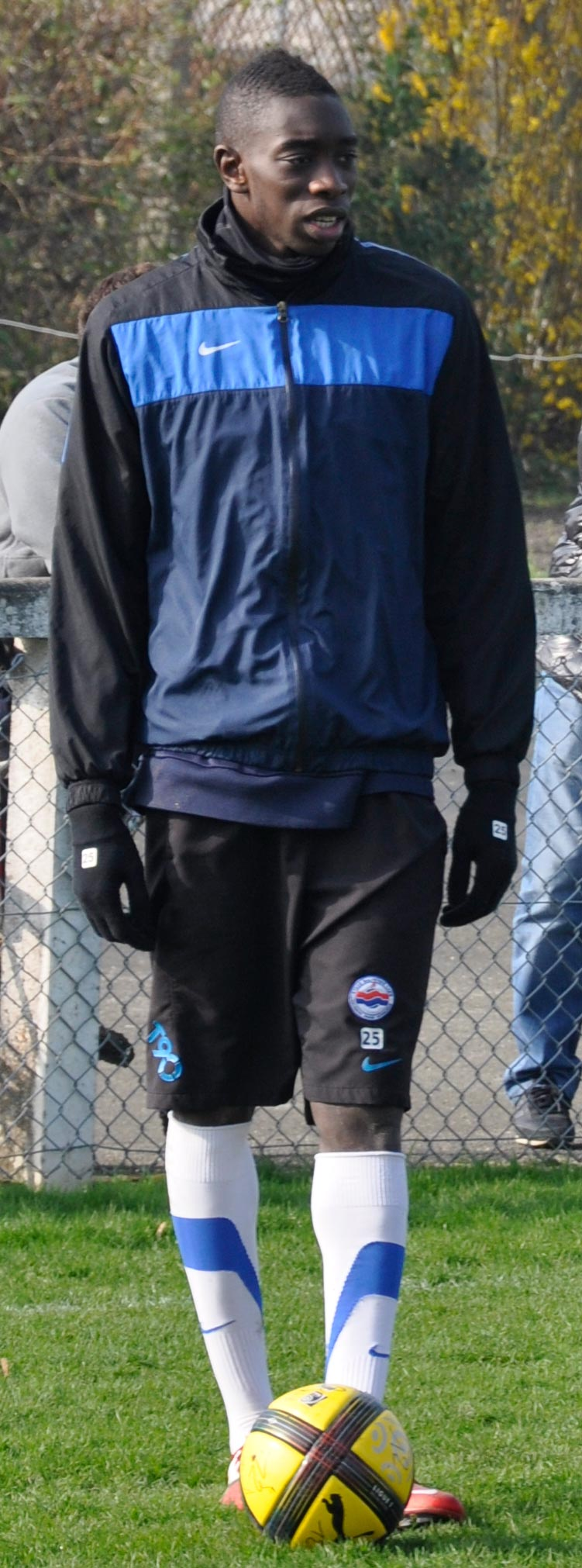 Sambou Yatabaré à l'entrainement